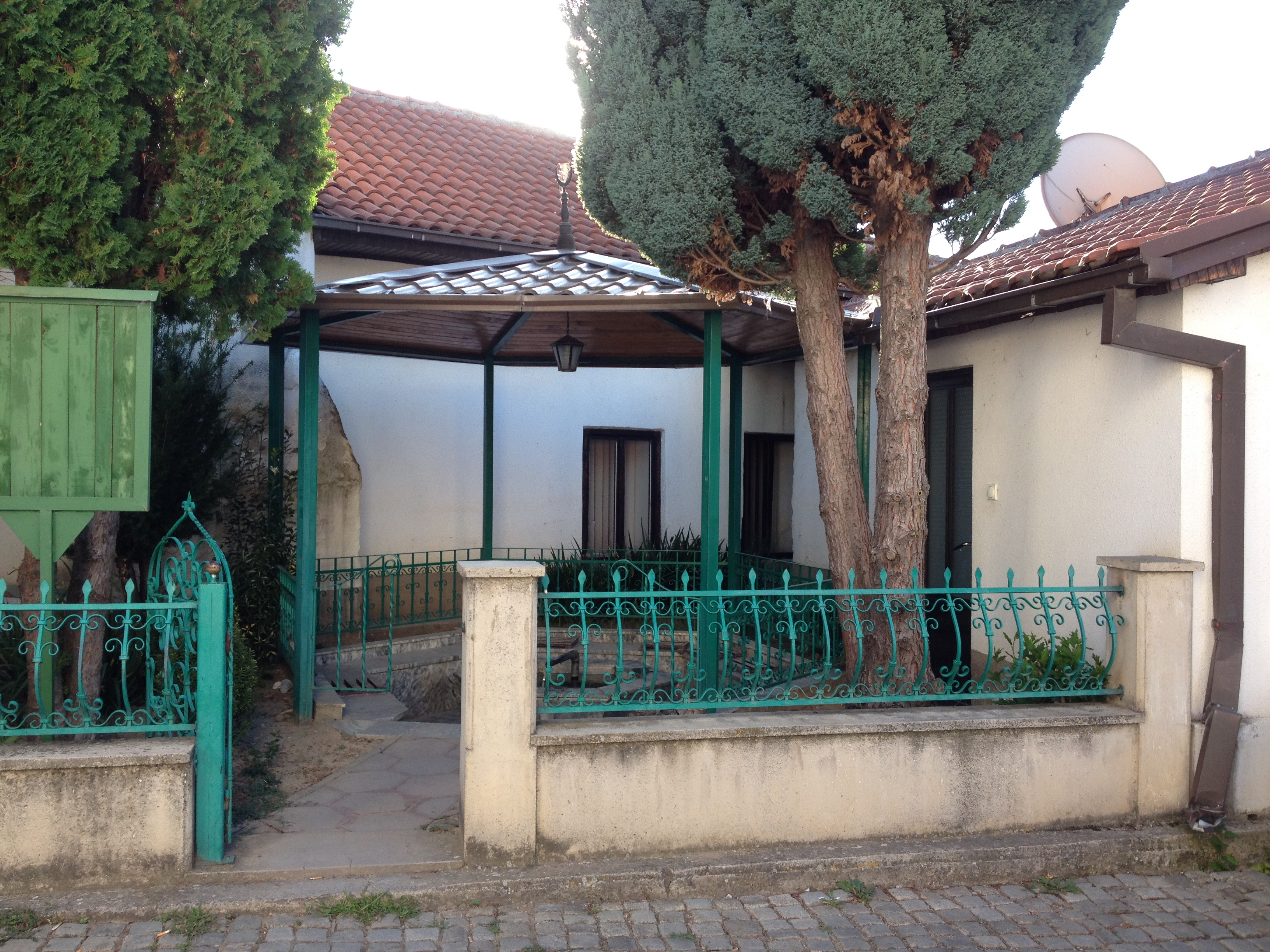 Die Kara-Bey-Moschee in Ohrid, Mazedonien